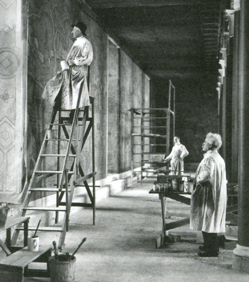 Prinsens galleri, prins Eugen i arbete med en medhjälpare